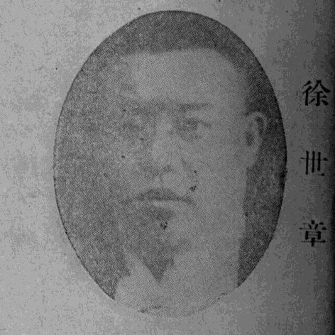 中文（台灣）: 《民國名人圖鑑》肖像